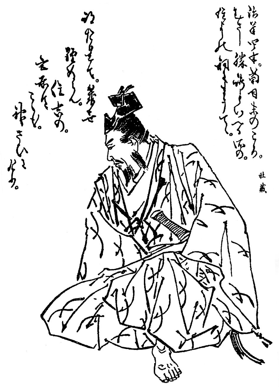 千葉常胤。平安時代末期 - 鎌倉時代初期／江戸時代『前賢故実』より。画：菊池容斎